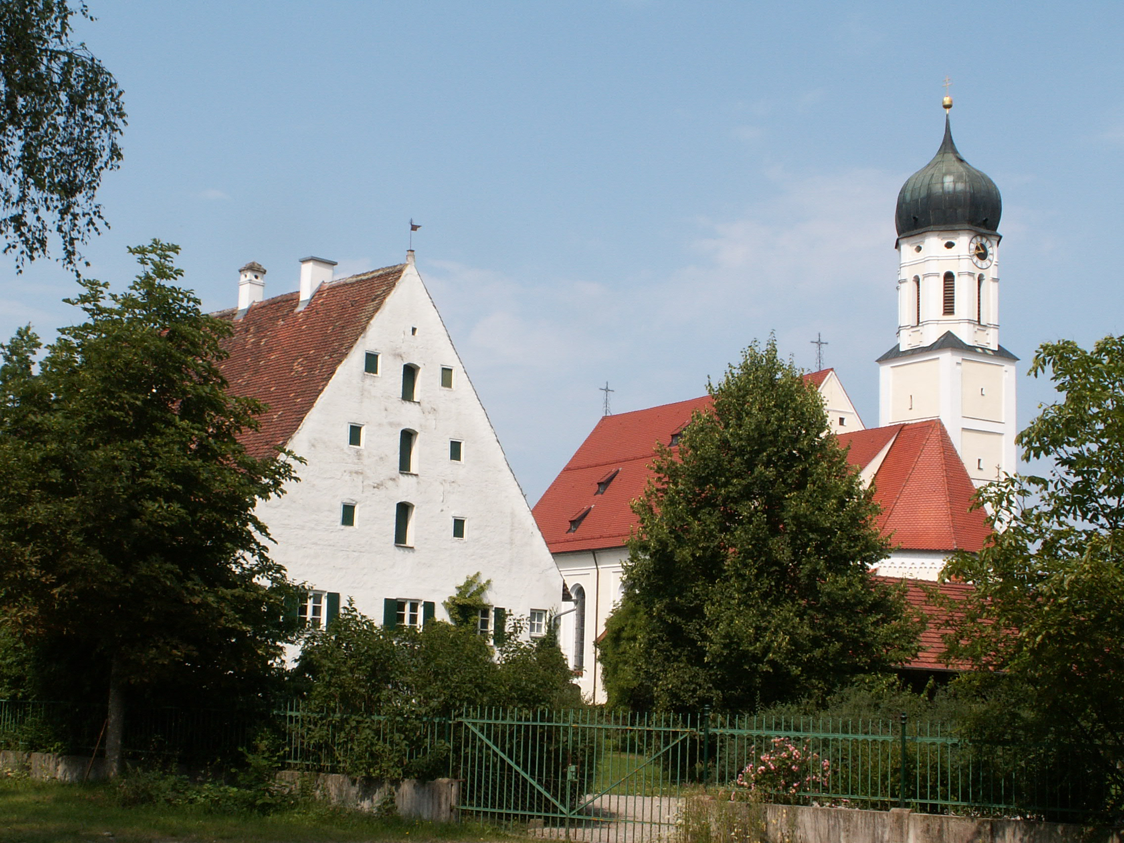 Ehem. Amtshaus in Asch, Fuchstal